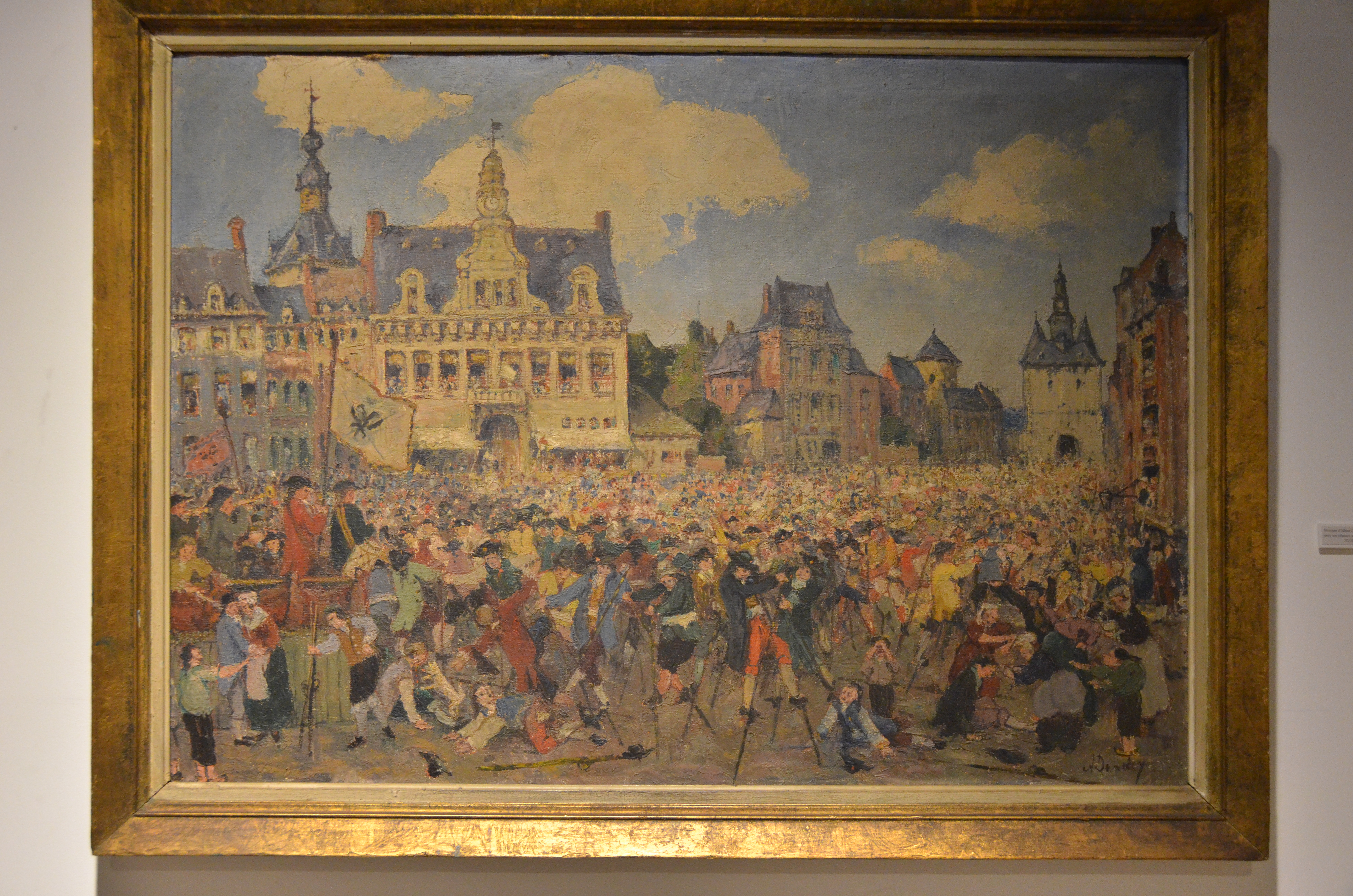 Peinture d'Auguste Dandoy - Combat d'échasses au marché Saint Rémi